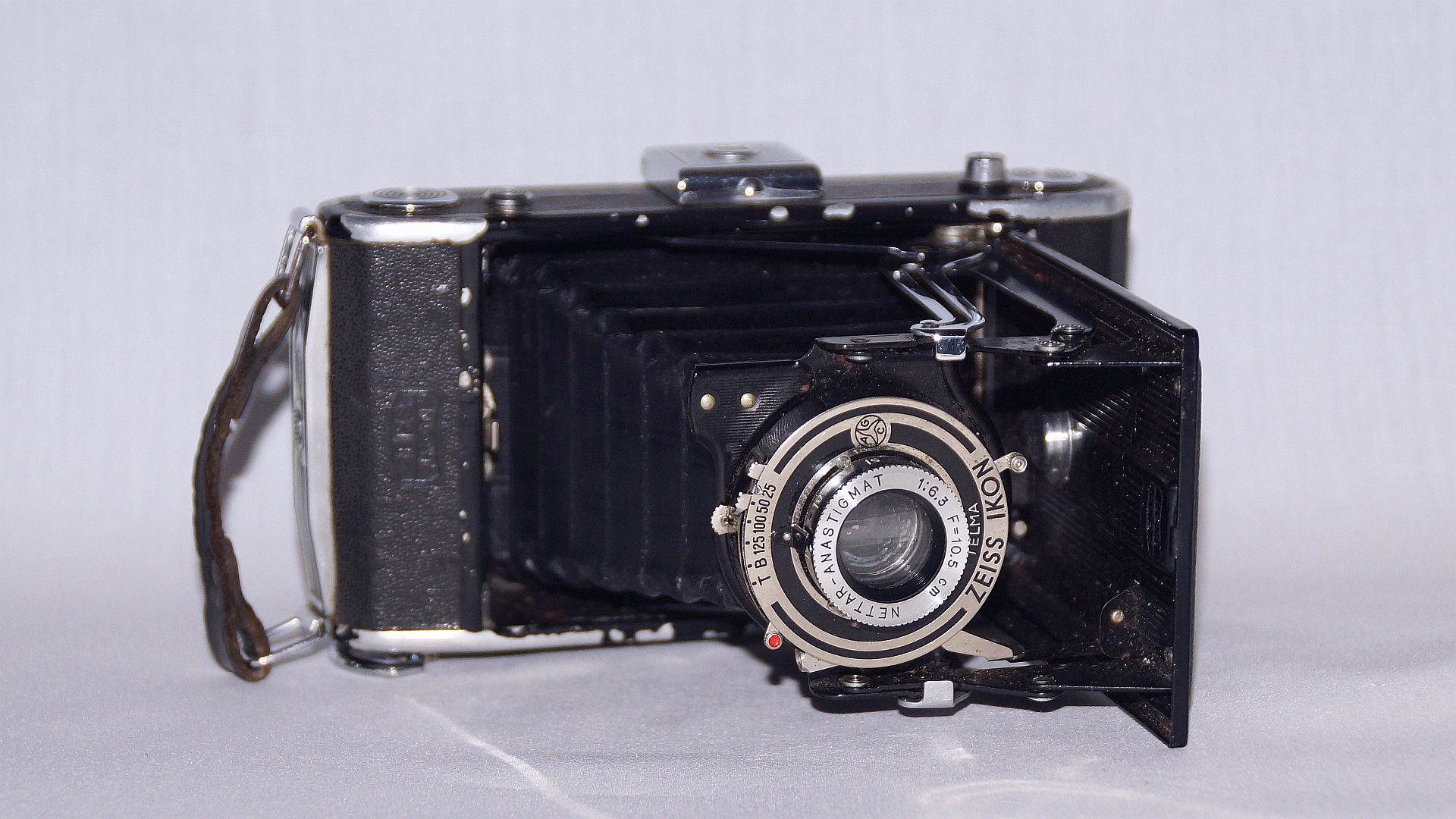 Zeiss Ikon Nettar 510 Nettar-Anastigmat 105mm per Balgenauszug 1:6,3 - Foto Wolfgang Pehlemann DSC04840